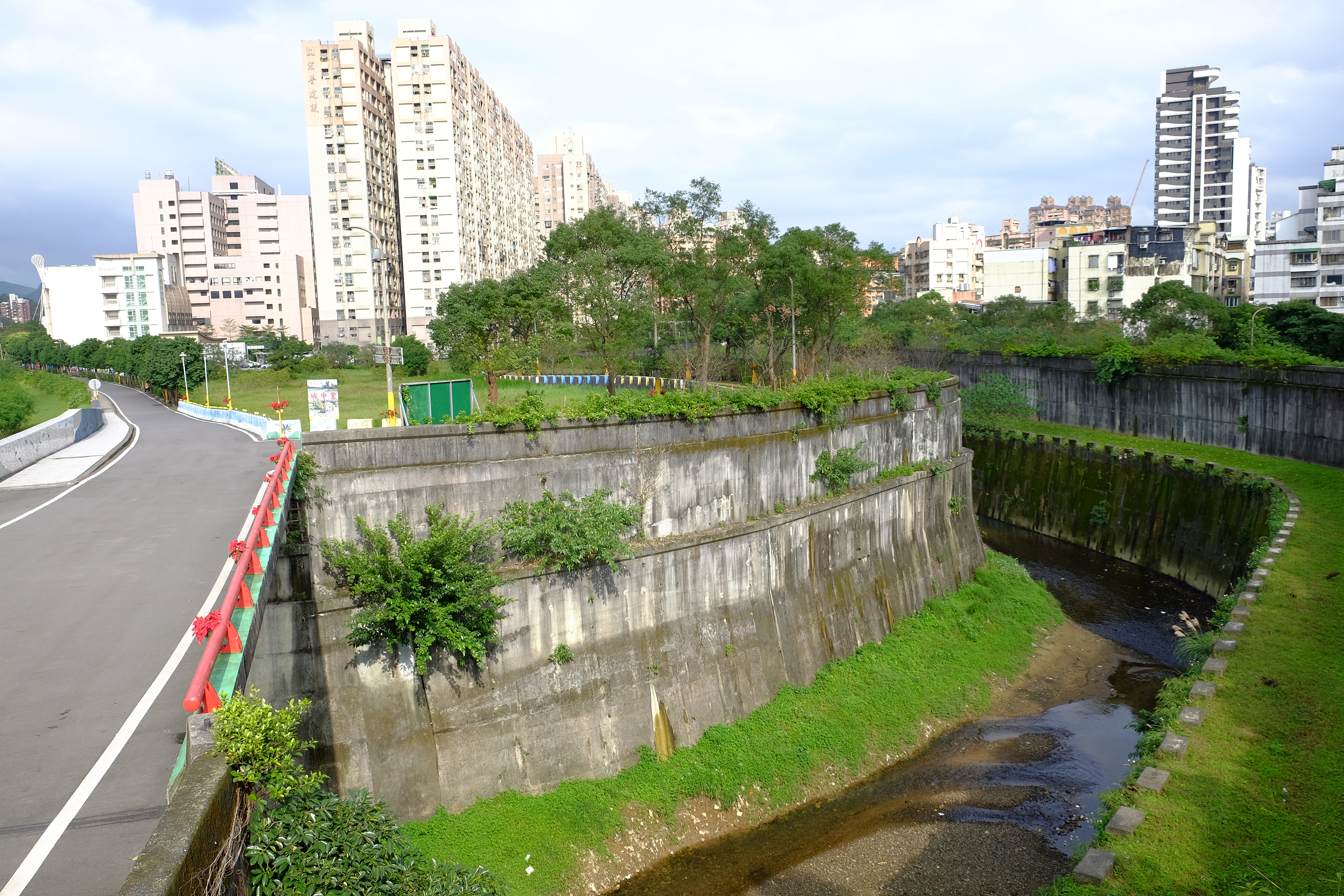 新北市汐止區茄苳溪匯入基隆河處